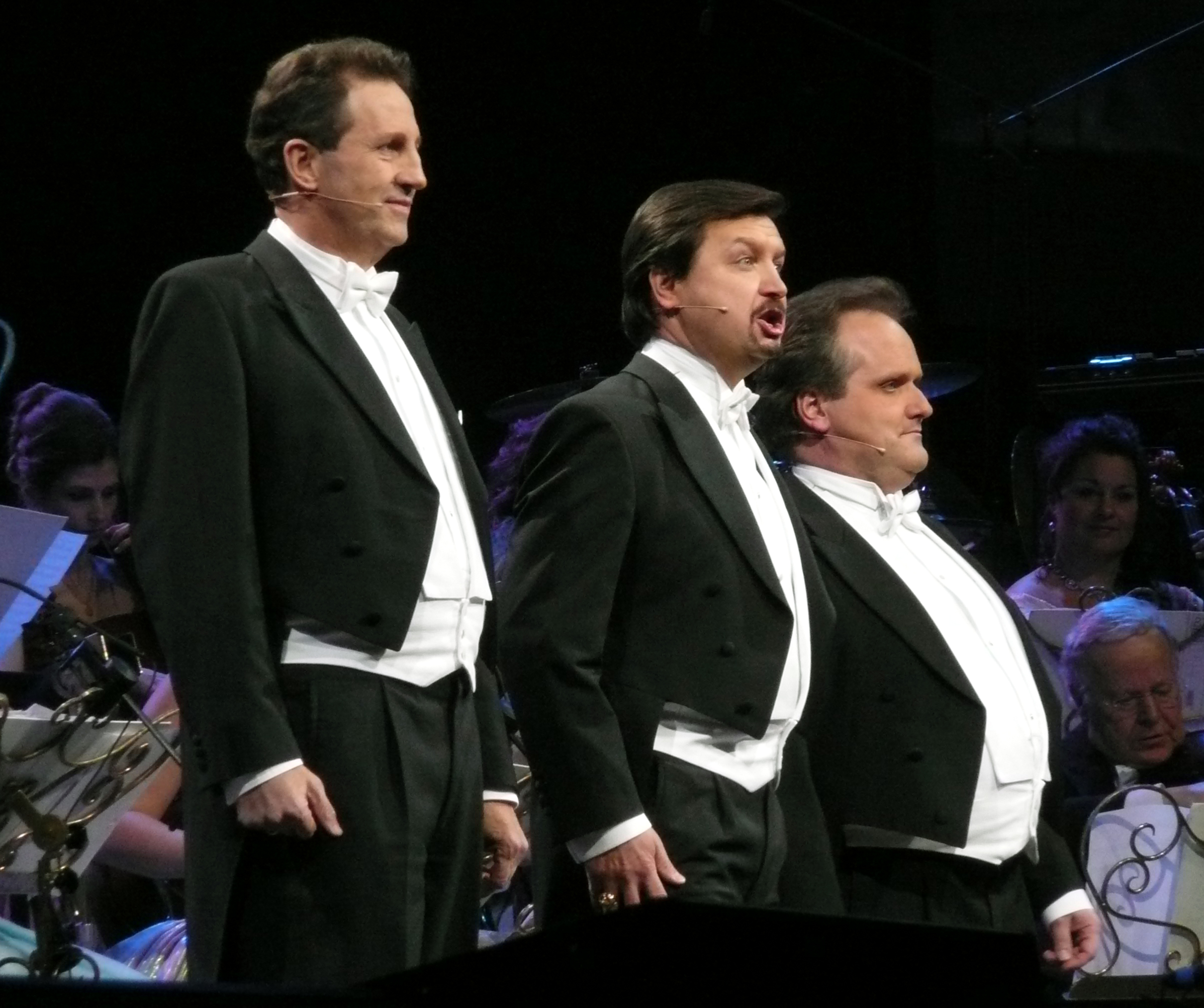 Die Platin-Tenöre am 02.01.2010 beim Auftritt in Köln (Andre-Rieu-Konzert)